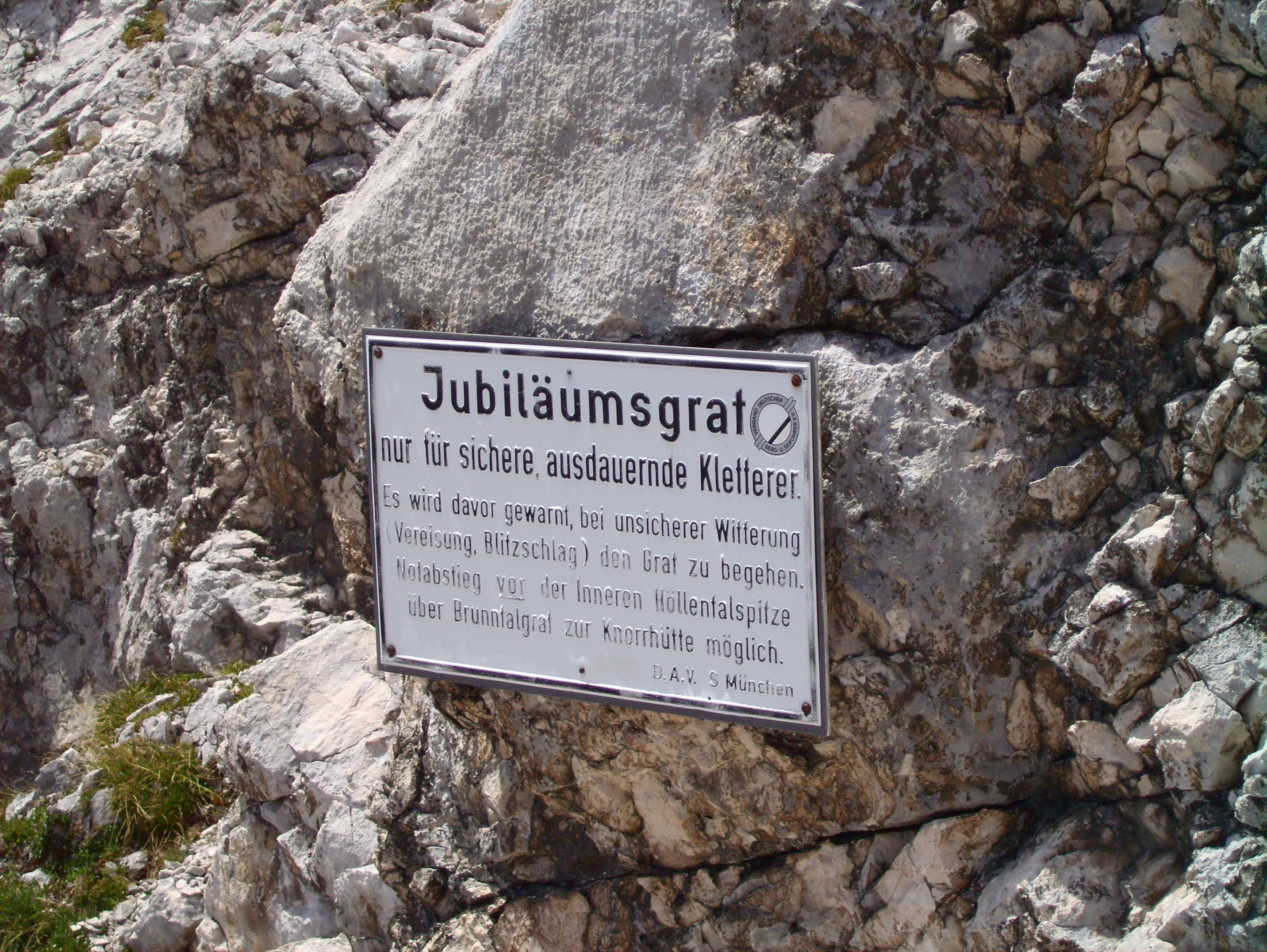 DAV Warnschild am Einstieg des Jubiläumsgrates